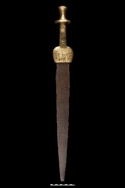 Espada de Guadalajara (Bronce Pleno). Número de inventario: 1962-9-1.